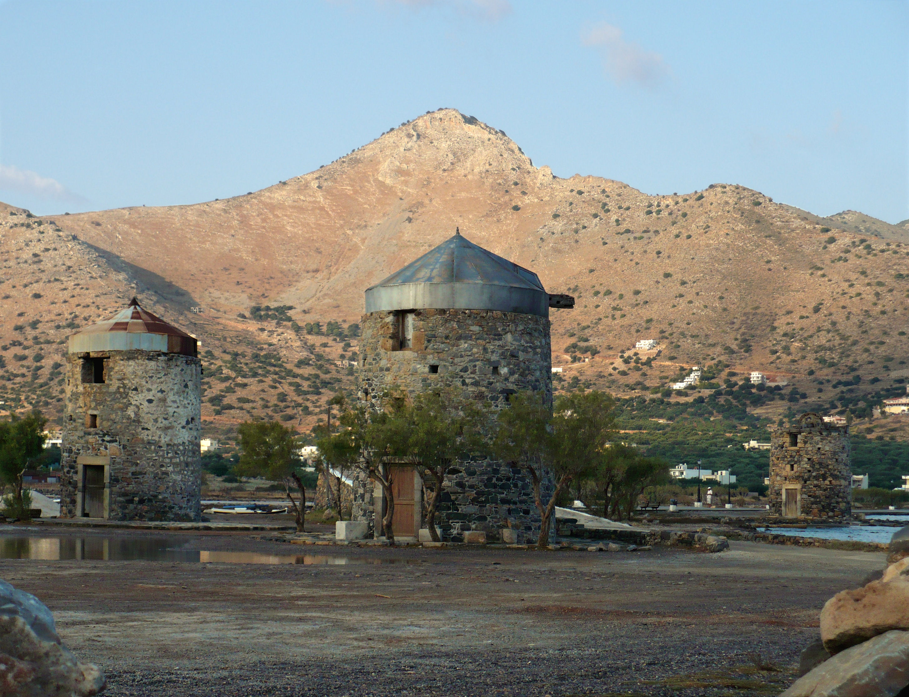 Elounda